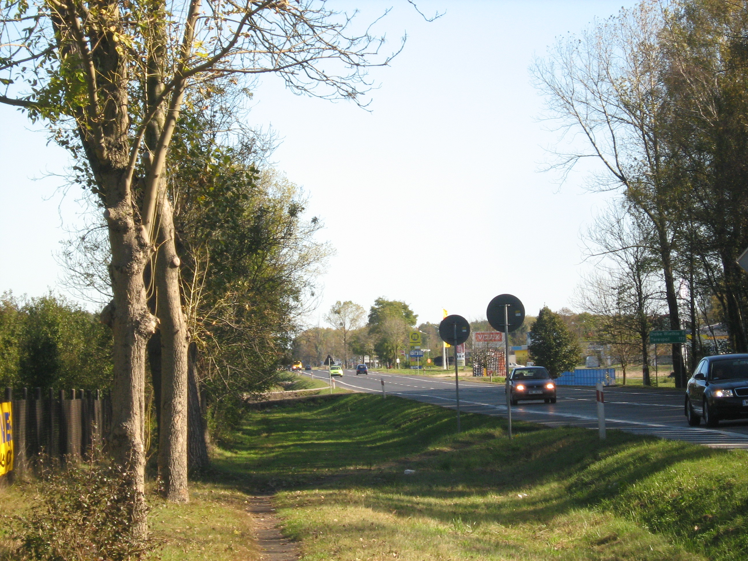 Stary Konik (Poland) Stary Konik